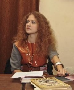 Галина Шиян на зустрічі з DBC Pierre.